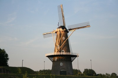 Grenmuelejo De Hoop (La Espero) Gorinchem.